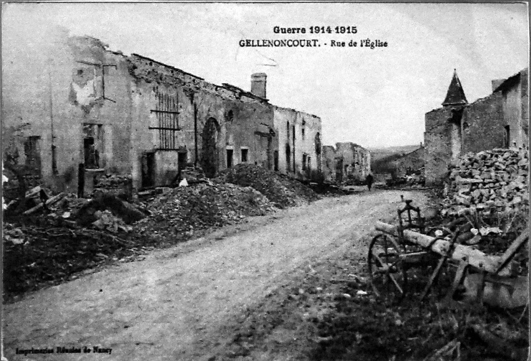 sur une vue ancienne.